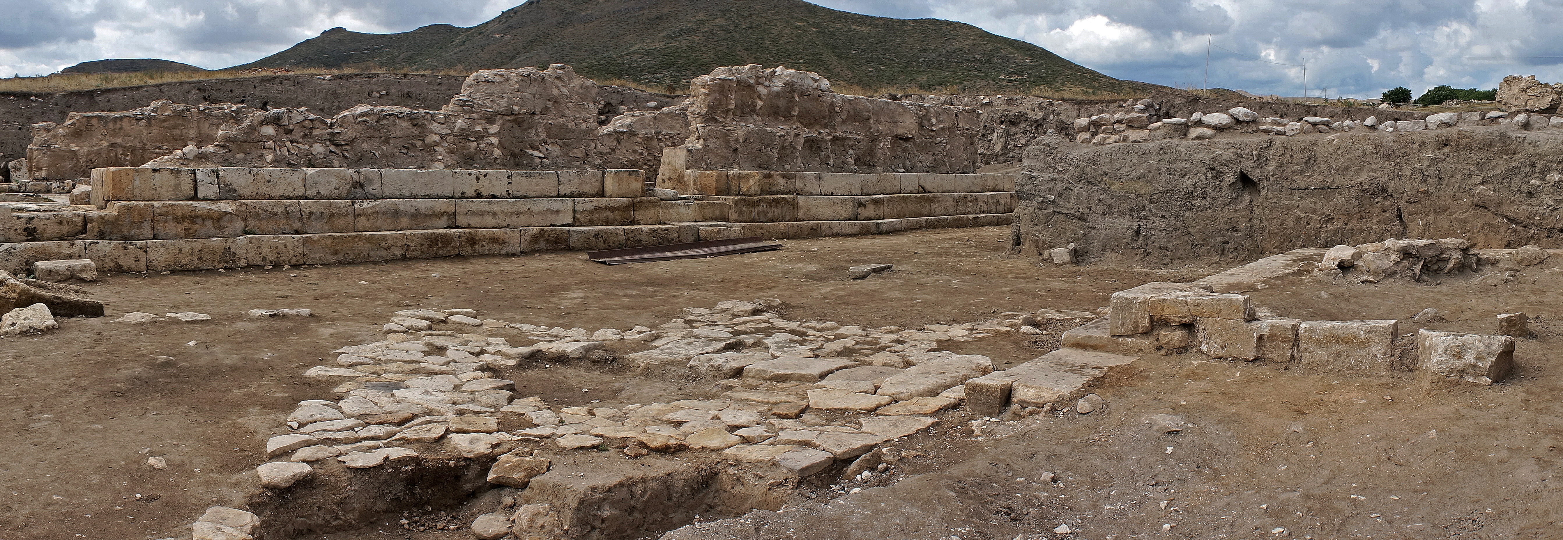 Gavur qala şəhərgahı. Orta əsrlər. Ağdam rayonu. Azərbaycan